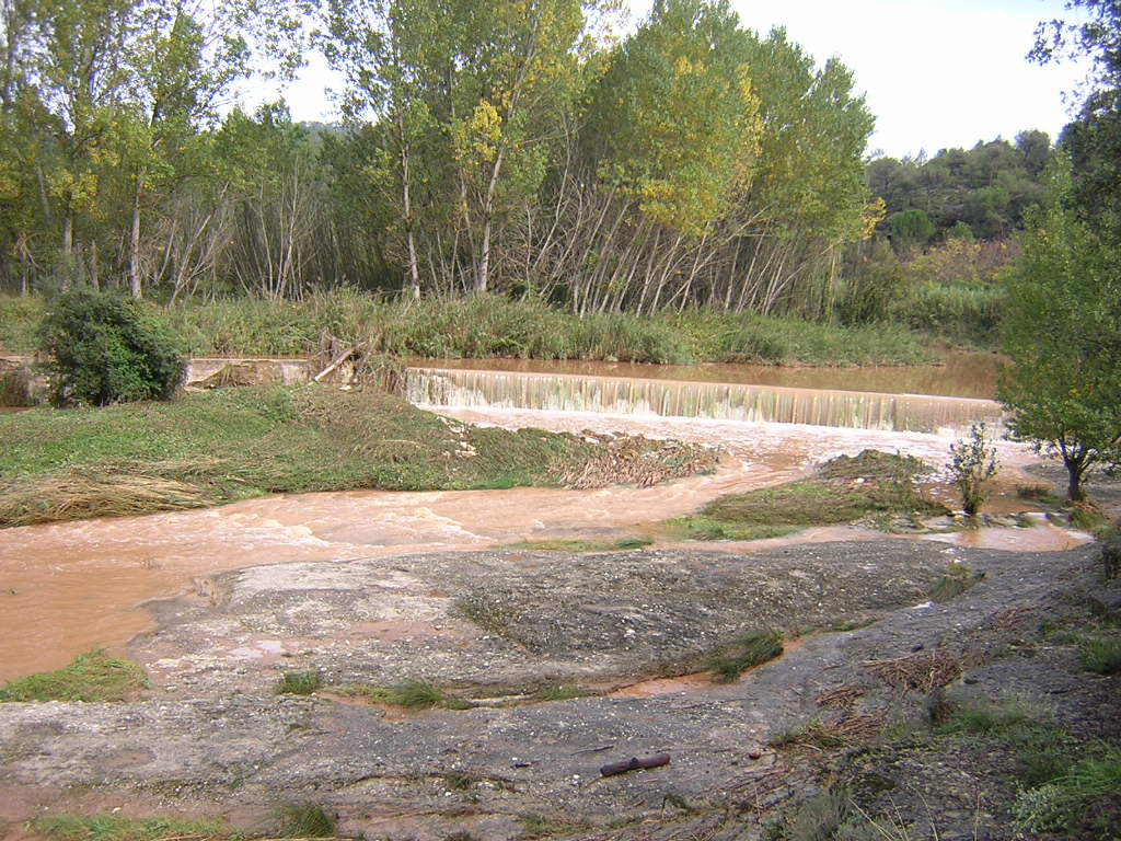 La Resclosa del Pla de Cardona (Monistrol de Calders, Moianès)